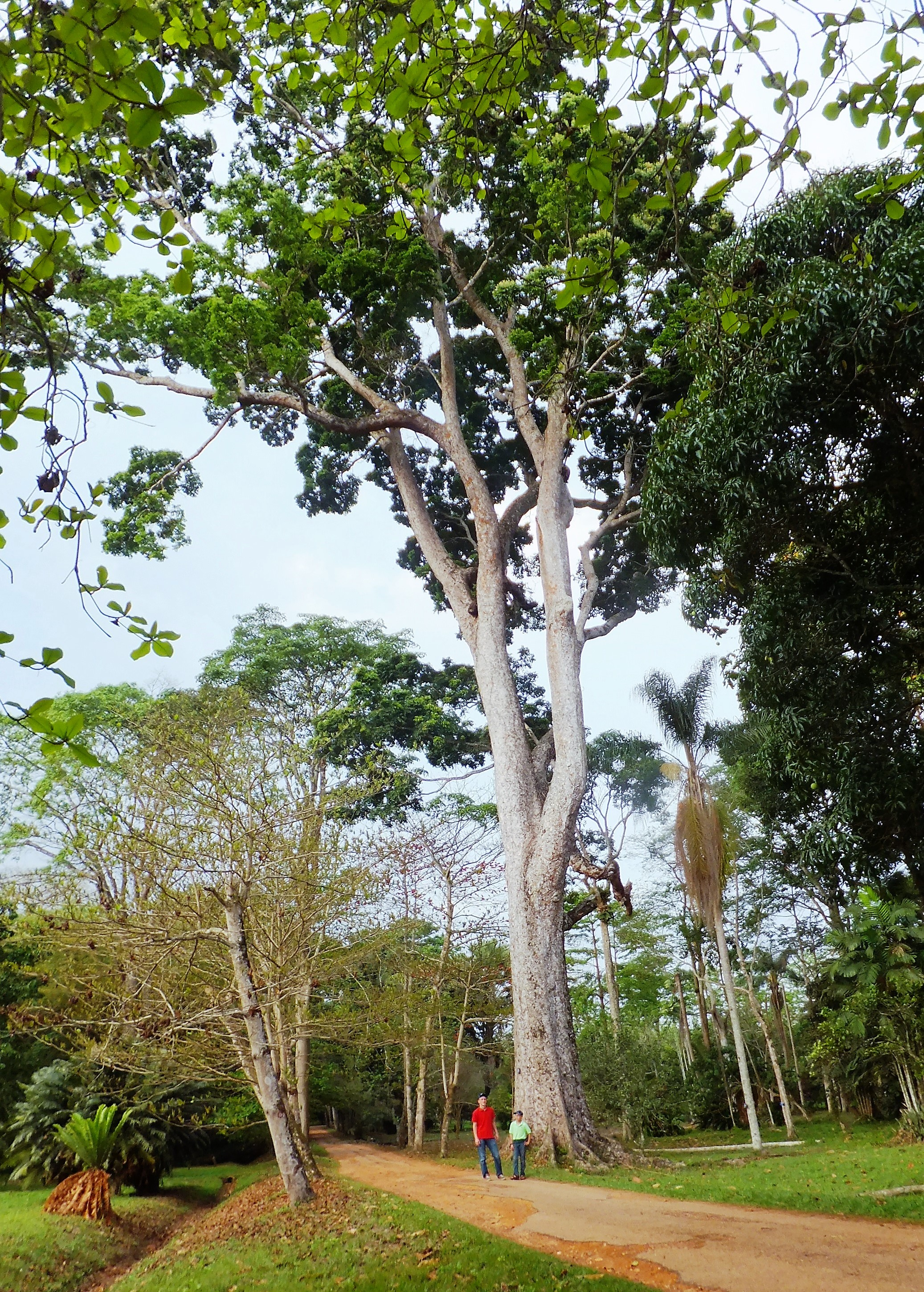 Jardin du père Gillet à Kisantu Khaya ivorensis A. Chev., l'acajou d'Afrique ; Échelle : garçon en rouge fait 1,90 m.